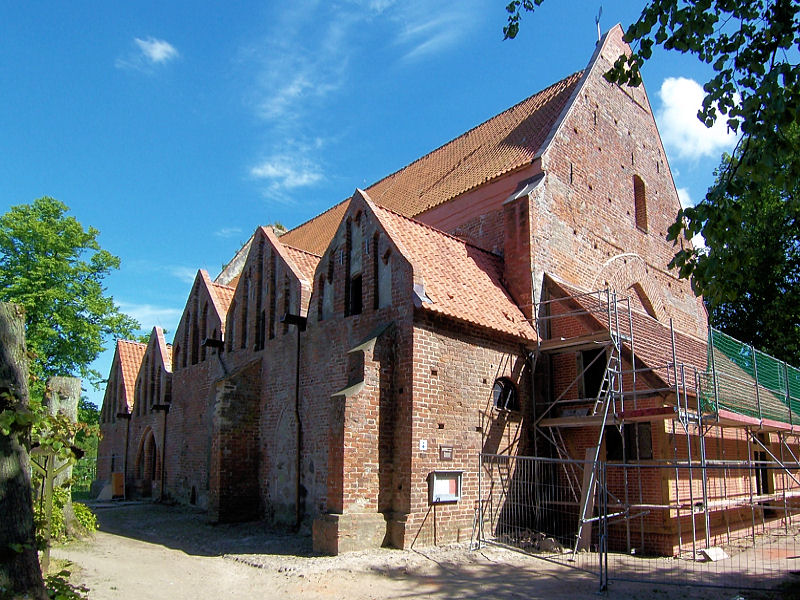 Kirche in Niepars, Mecklenburg-Vorpommern